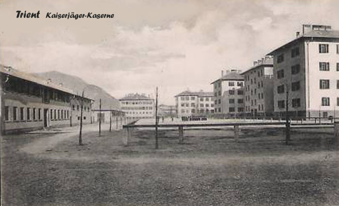 Kaiserjägerkaserne in der Via Perini in Trient